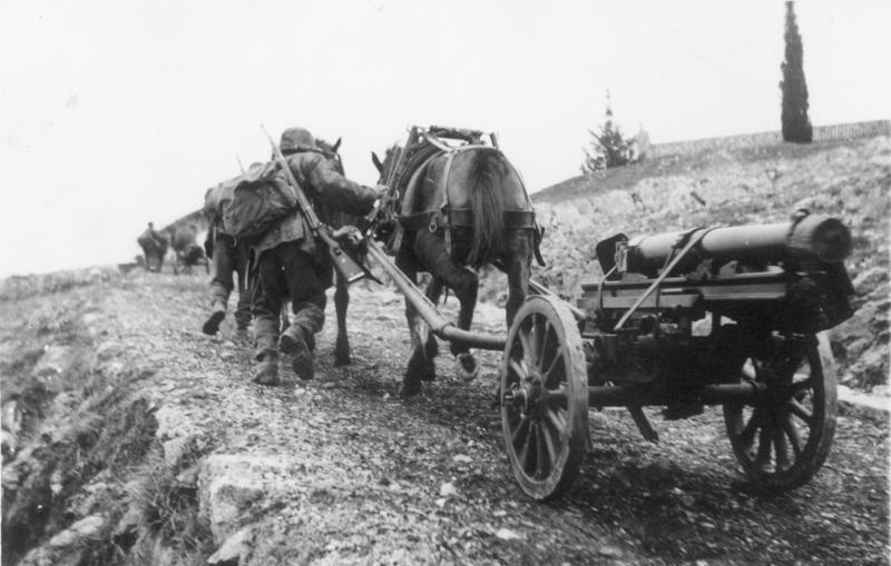 Die Karstschulungsstätte Pottenstein/Oberfranken Ein Bilderatlas mit Erläuterungen Zusammengestellt von SS-Standartenführer Dr. Brand. Der Karstkampf erfordert eine geschulte, leichtbewegliche Artillerie